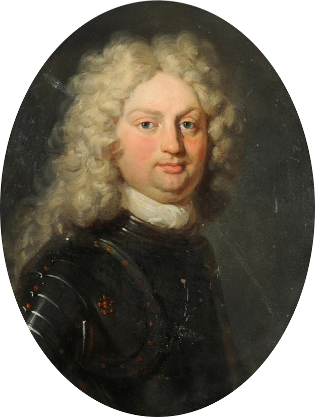 Bildnis Johann Anton Tillier (1675 - 1731), Schultheiss des Äusseren Standes 1701, CC 1710, Kleiner Rat 1714, Venner zu Mittellöwen 1717, Deutschseckelmeister 1731. Wurde von Kaiser Karl VI. in den Ritterstand erhoben.